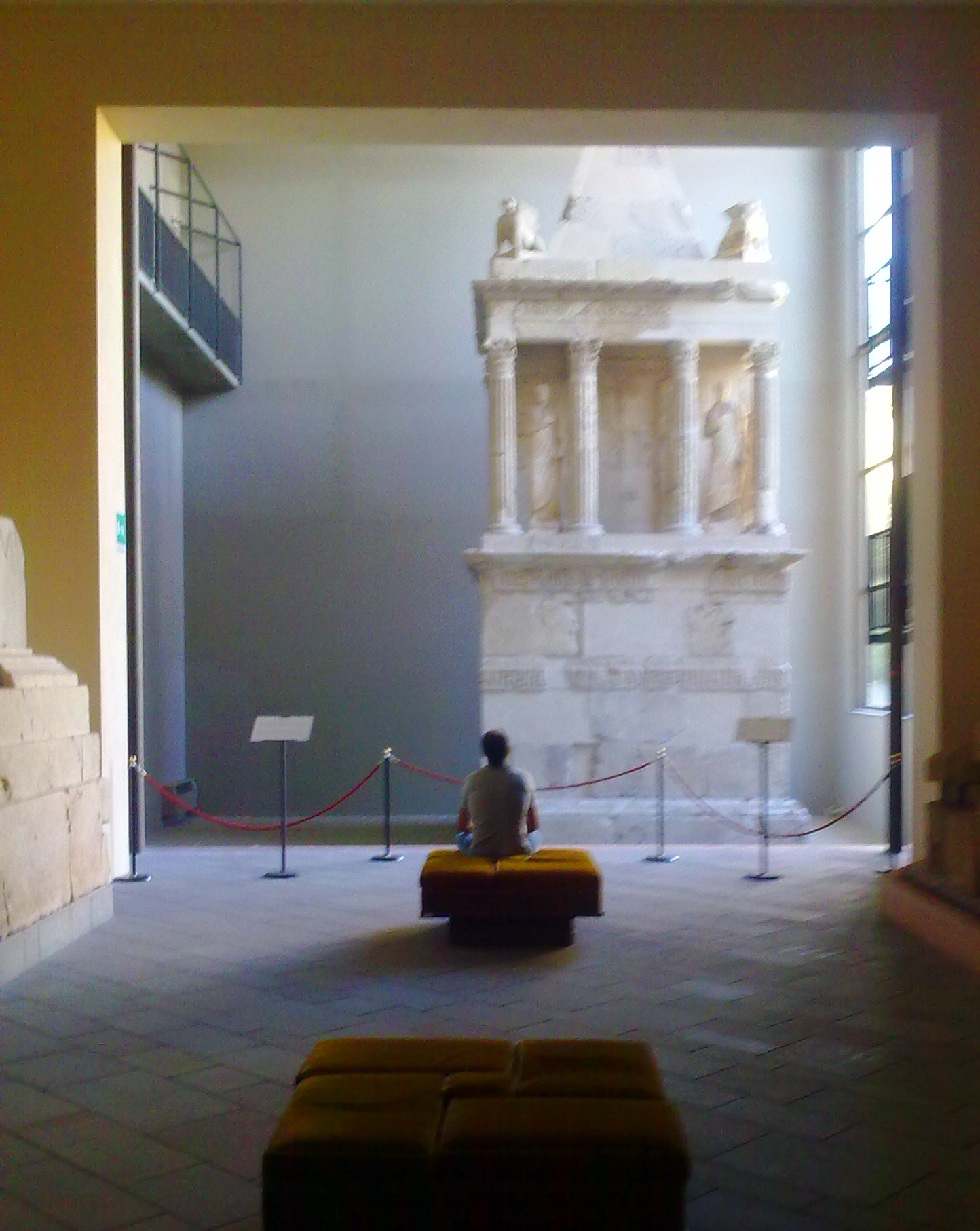 Mausoleo di Rufus, Museo Archeologico Nazionale di Sarsina